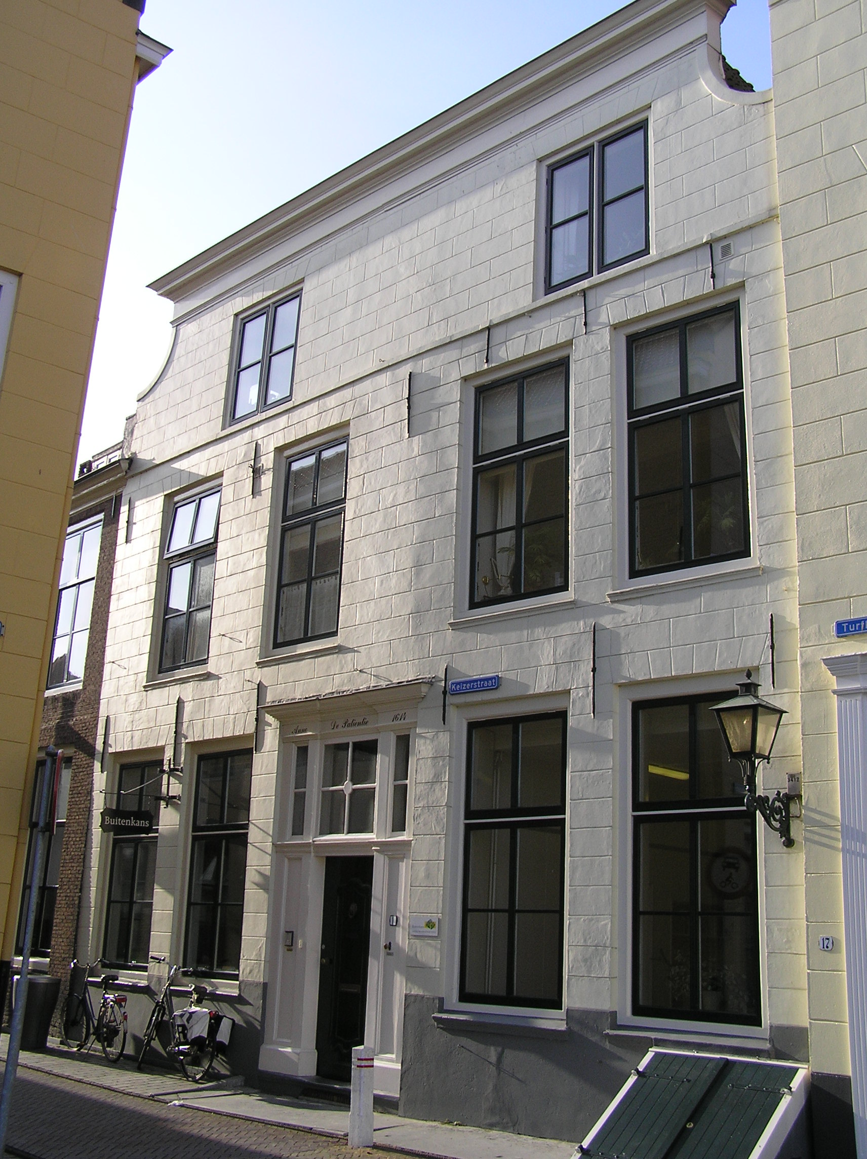 Goes, Keizerstraat 1, De Salienlie, rijksmonument